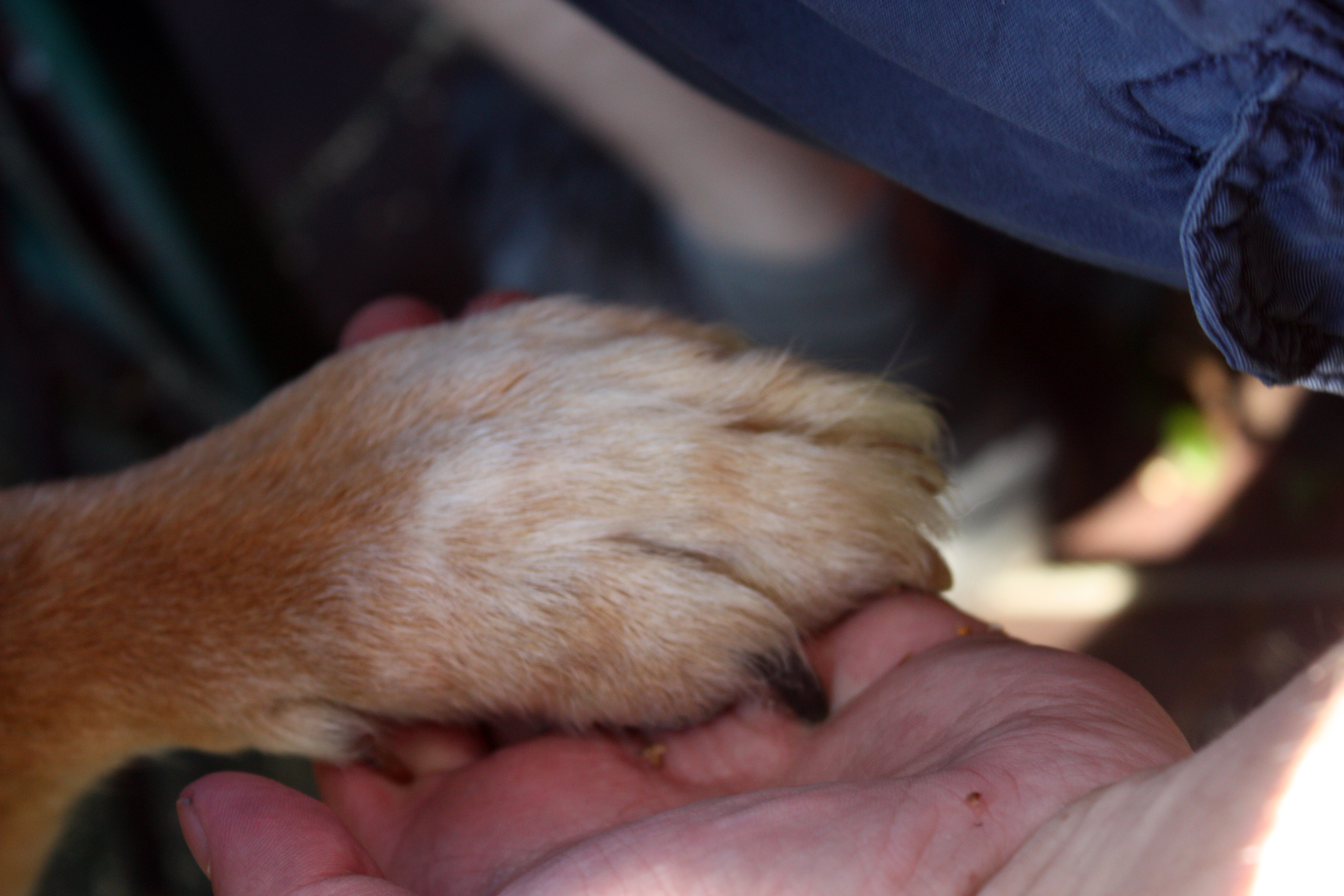 WikiWuff